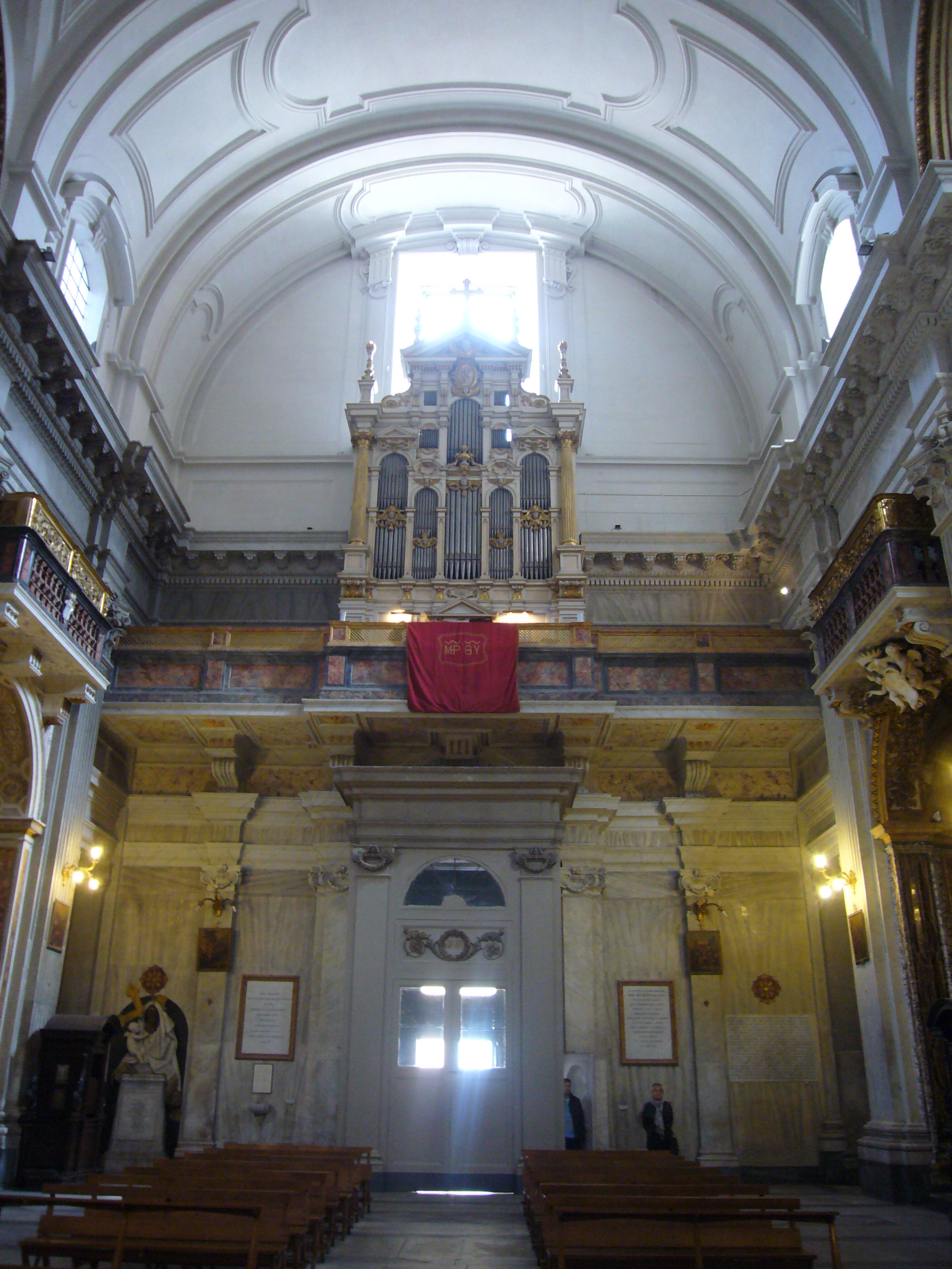 Roma, S. Maria in Portico, controfacciata e organo.